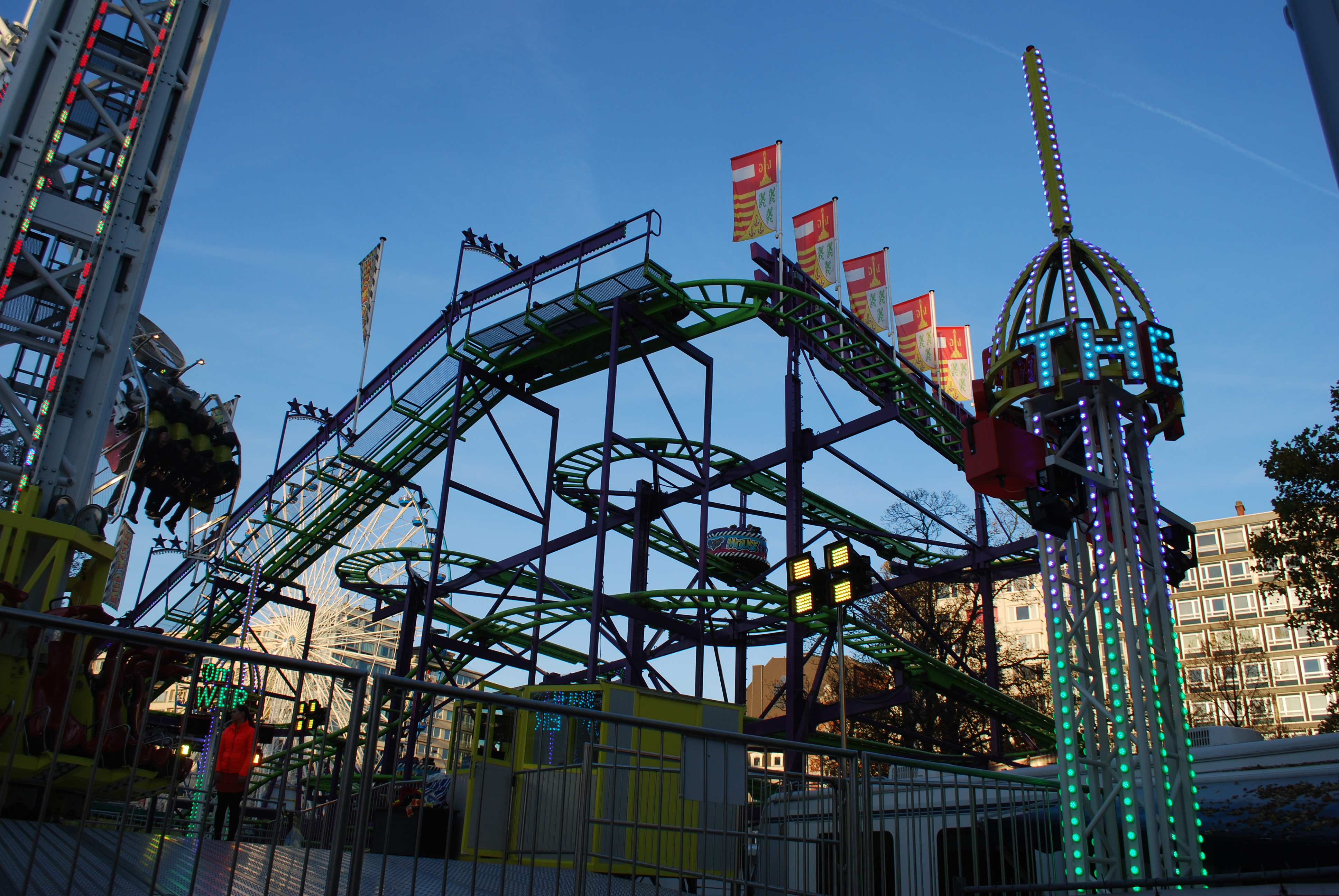 Vue de la Foire de Liège en 2015.